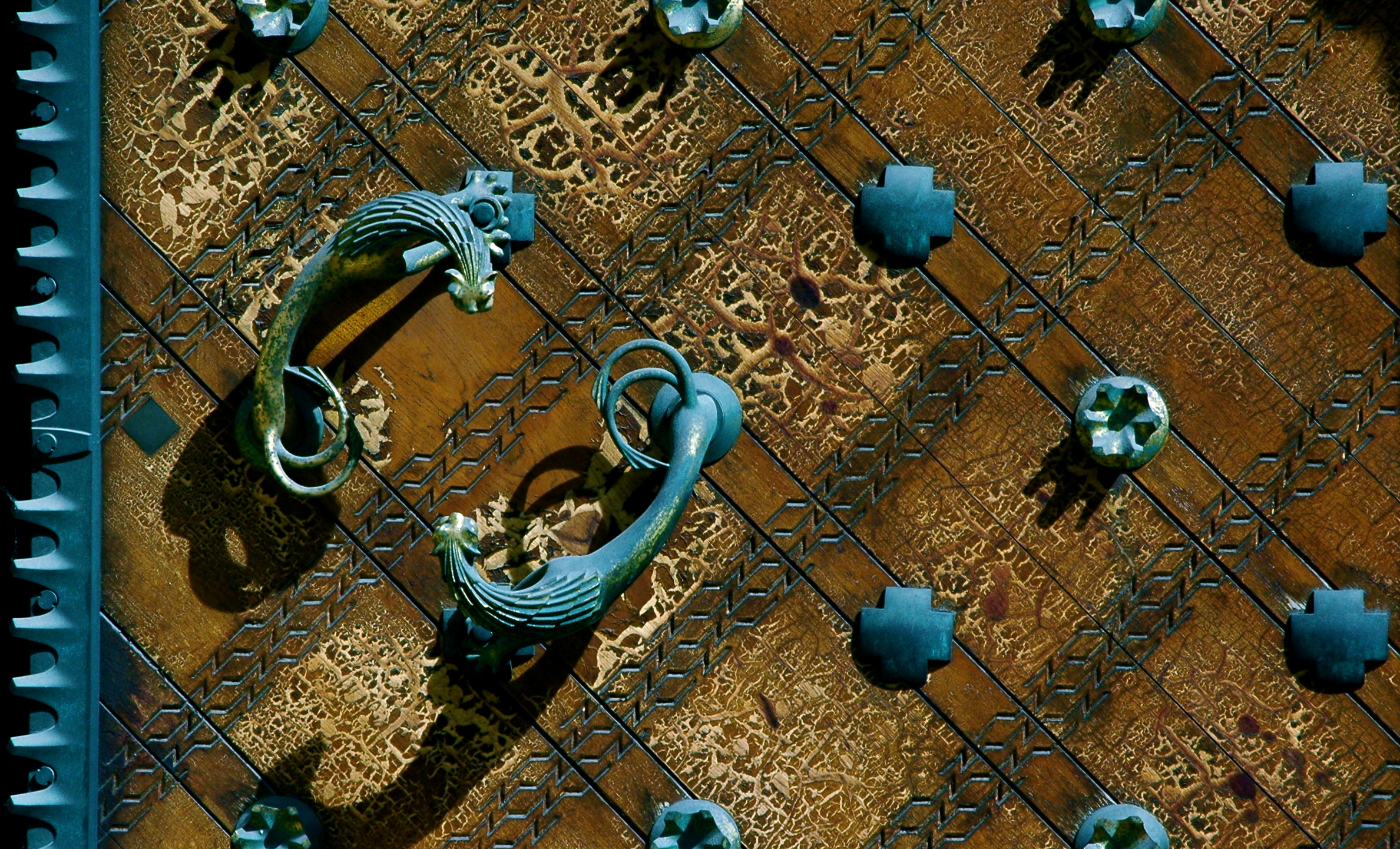 Praha, Katedrála svatého Víta, Václava a Vojtěcha, detail dveří Zlaté brány